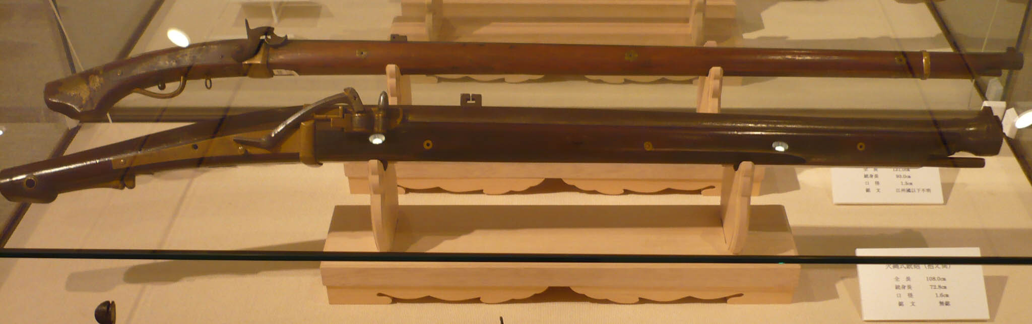 火縄式銃砲